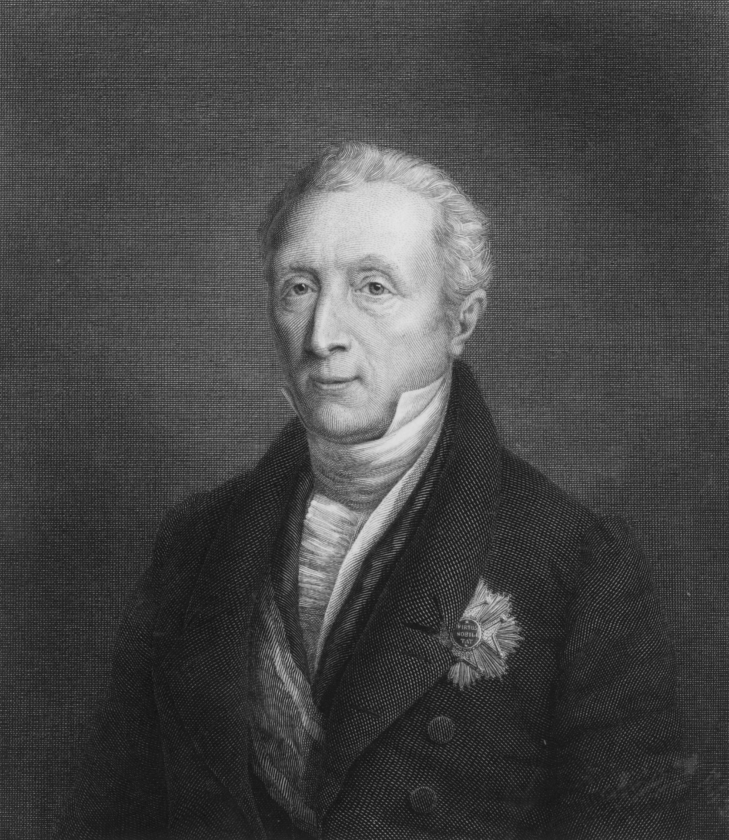 Nederlands staatsman